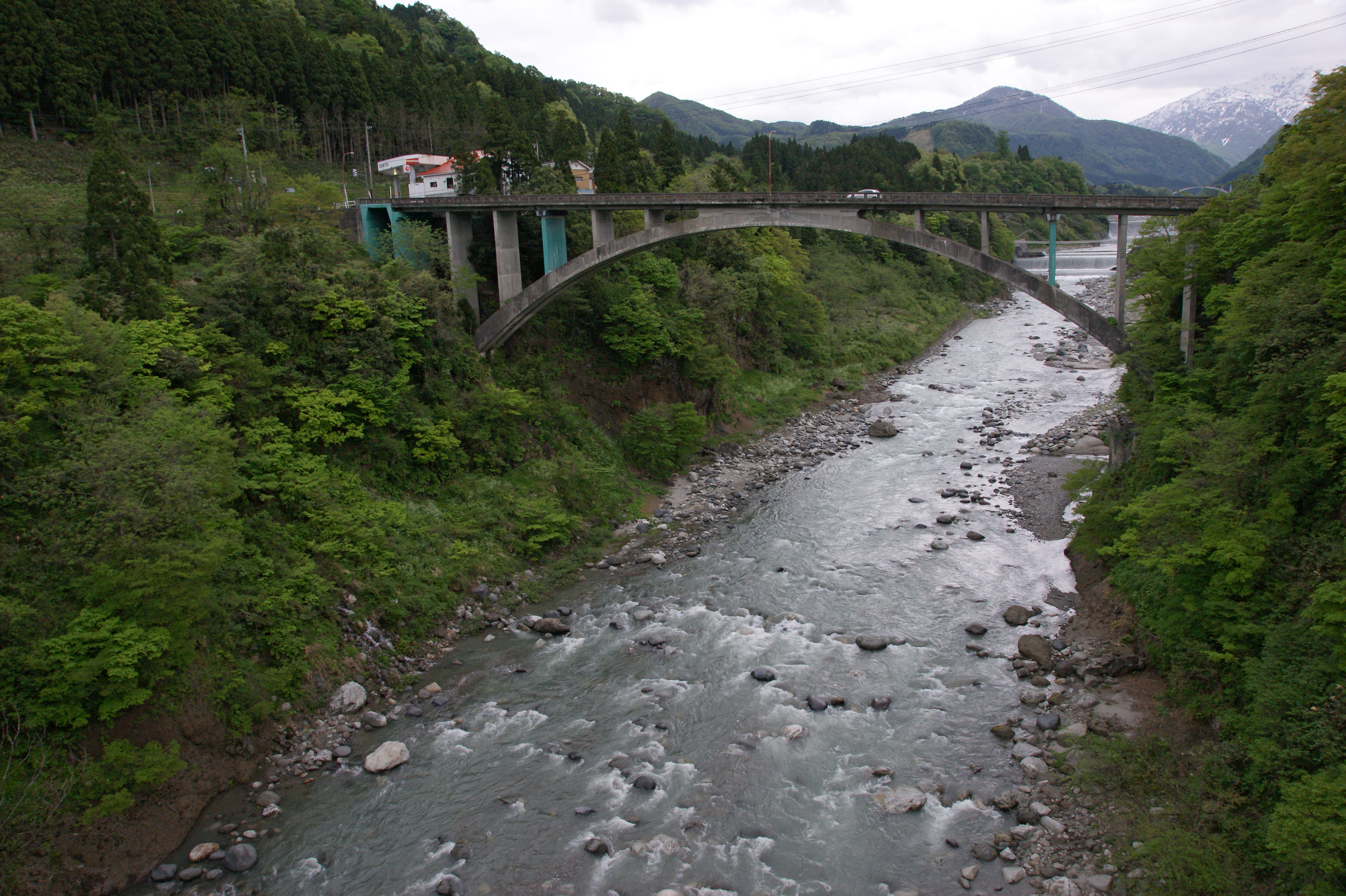 Joganji River at Toyama, Toyama prefecture, Japan